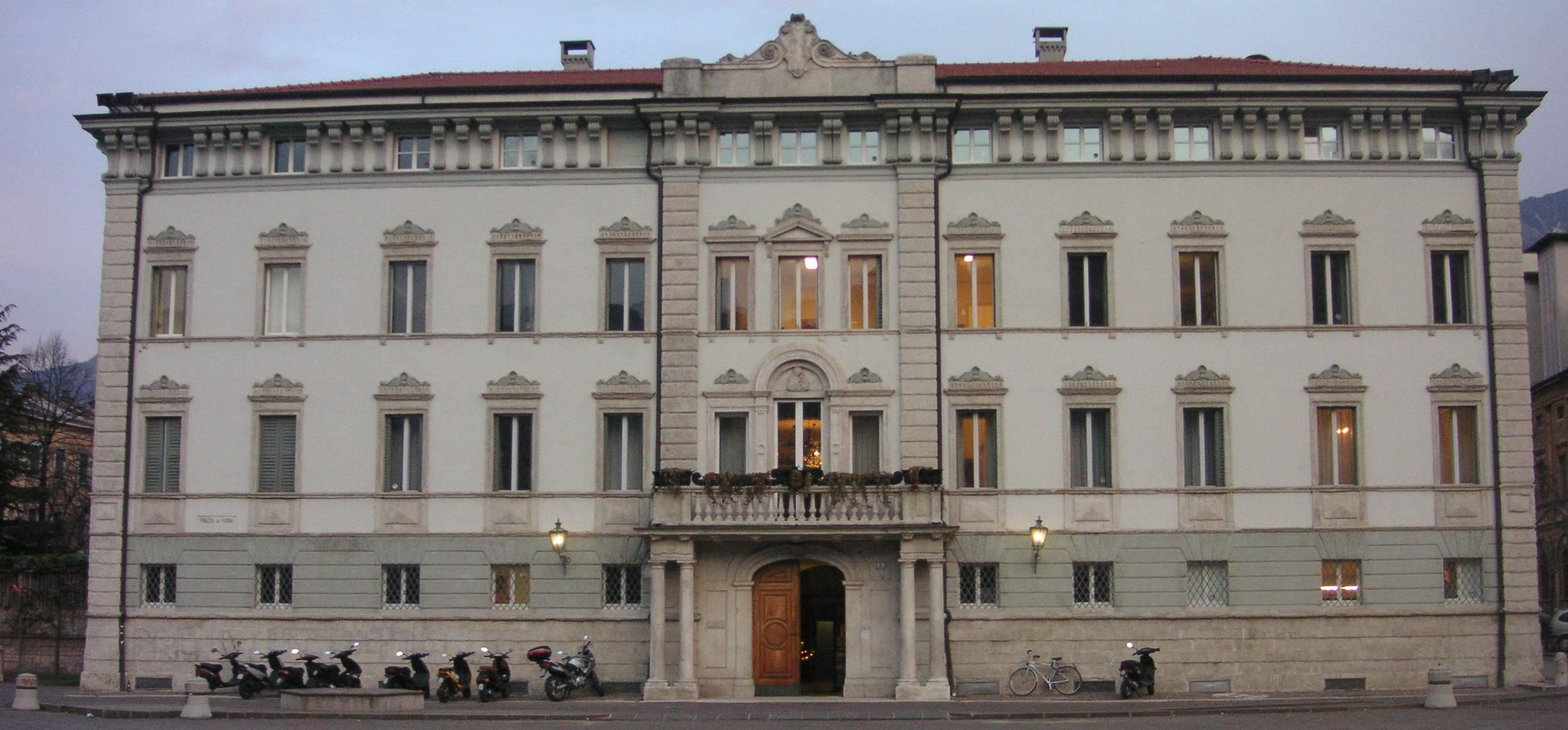 Il Palazzo del Vescovo (già dei Principi-Vescovi di Trento) in Piazza Fiera a Trento